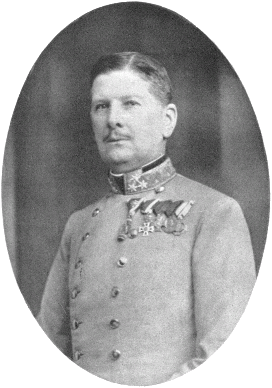 Rudolf Nikolaus Ritter von Brudermann (1851-1941), Austrian-Hungarian general